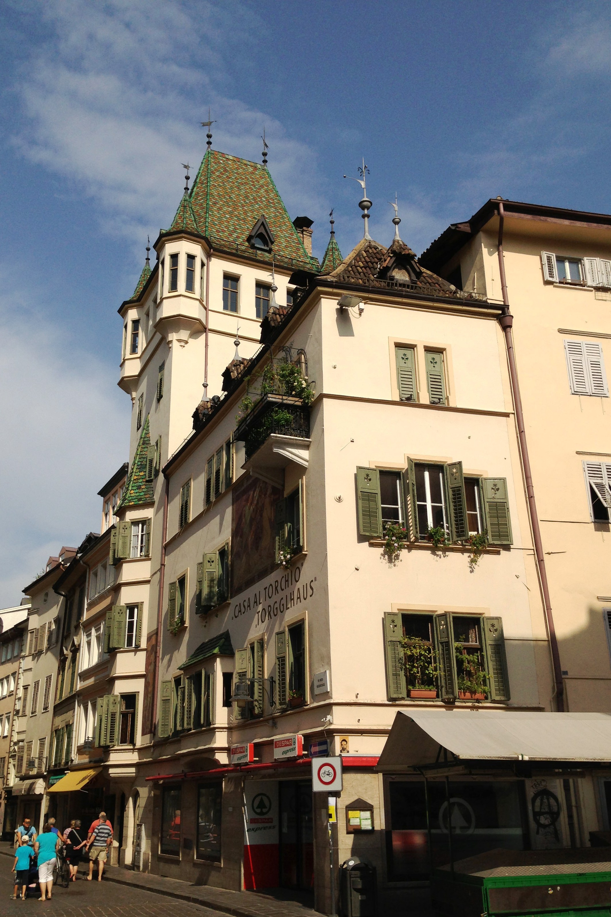 Das Torgglhaus in Bozen (Ostansicht)